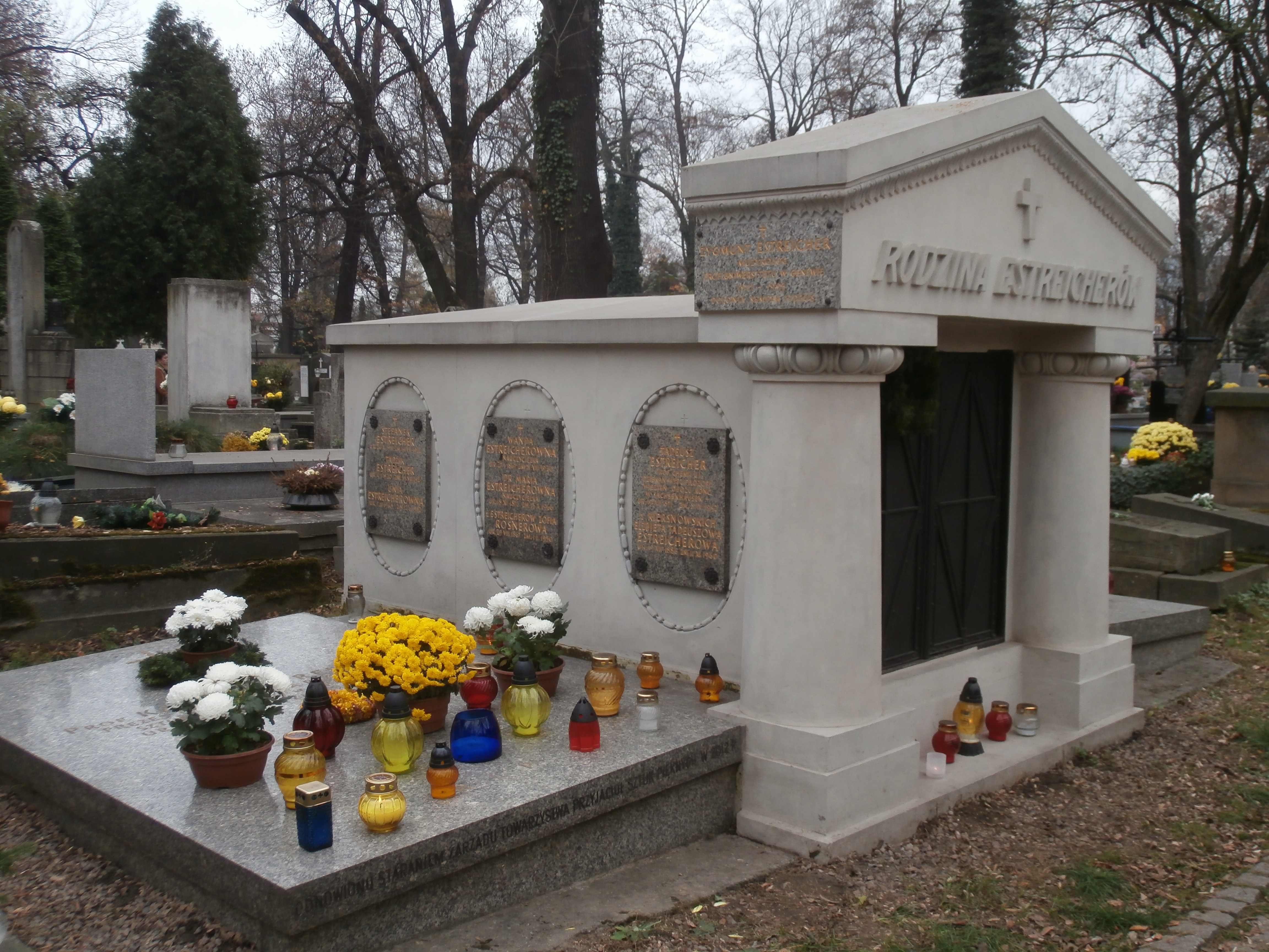 Grobowiec Estreicherów na Cmentarzu Rakowickim w Krakowie (stan po renowacji).